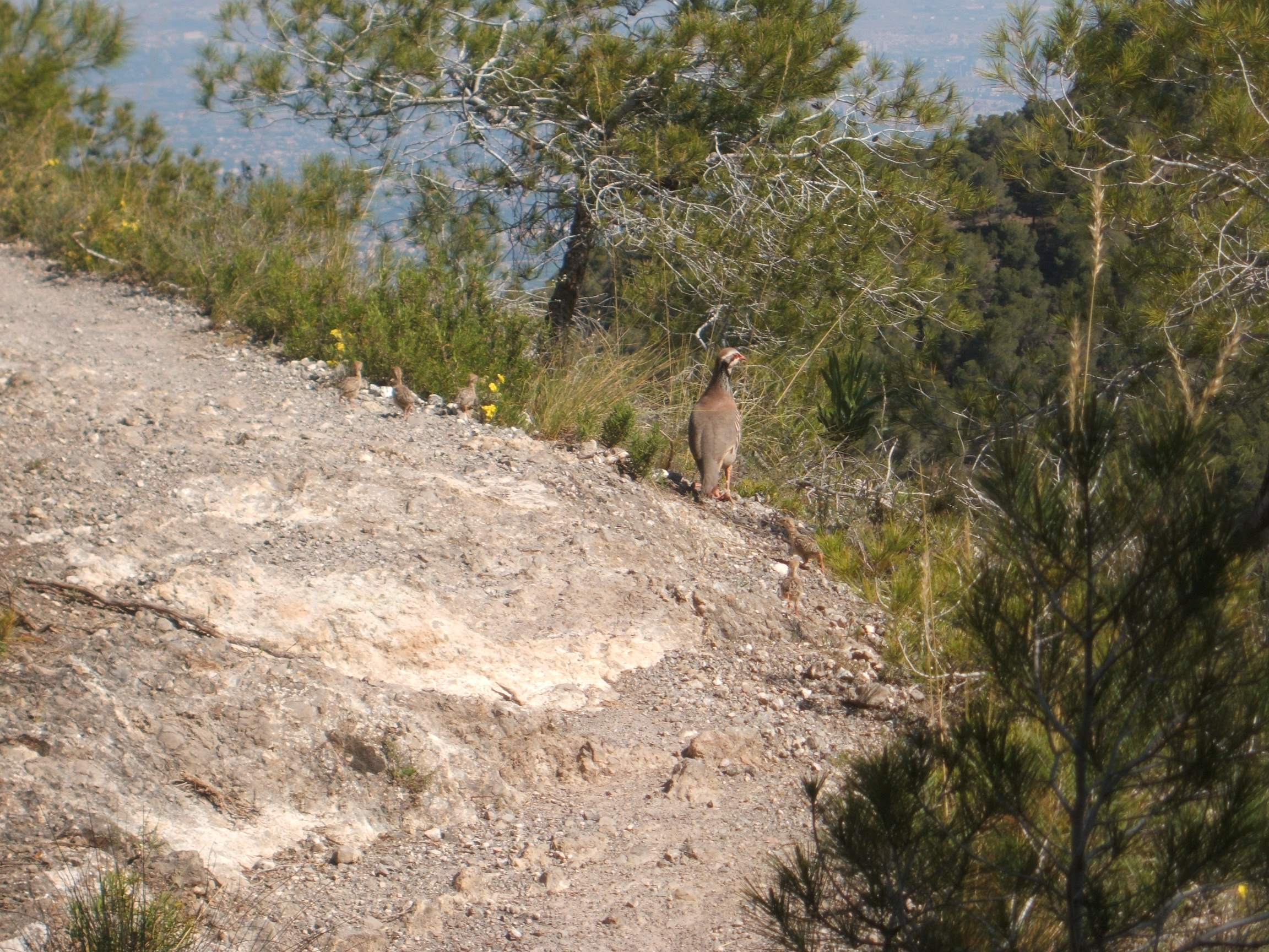 Carrascoy y El Valle This is a photography of a Special Area of Conservation in Spain with the ID: ES6200002. Natura2000 entry, EEA entry